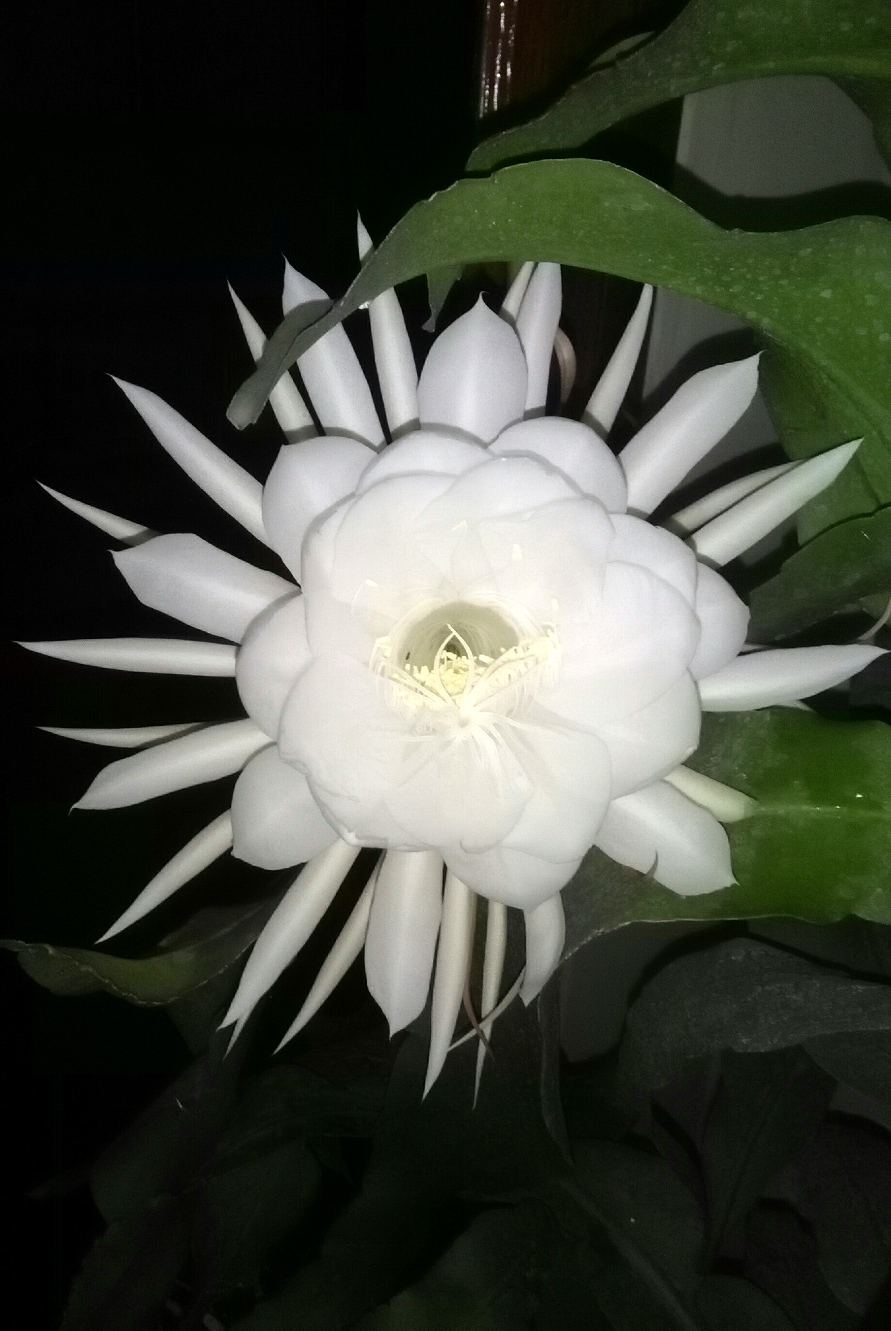 Bunga Wijayakusuma sedang mekar penuh. Diameter bunga sekitar 20-22 cm. (Foto: Yudi Rohmad)